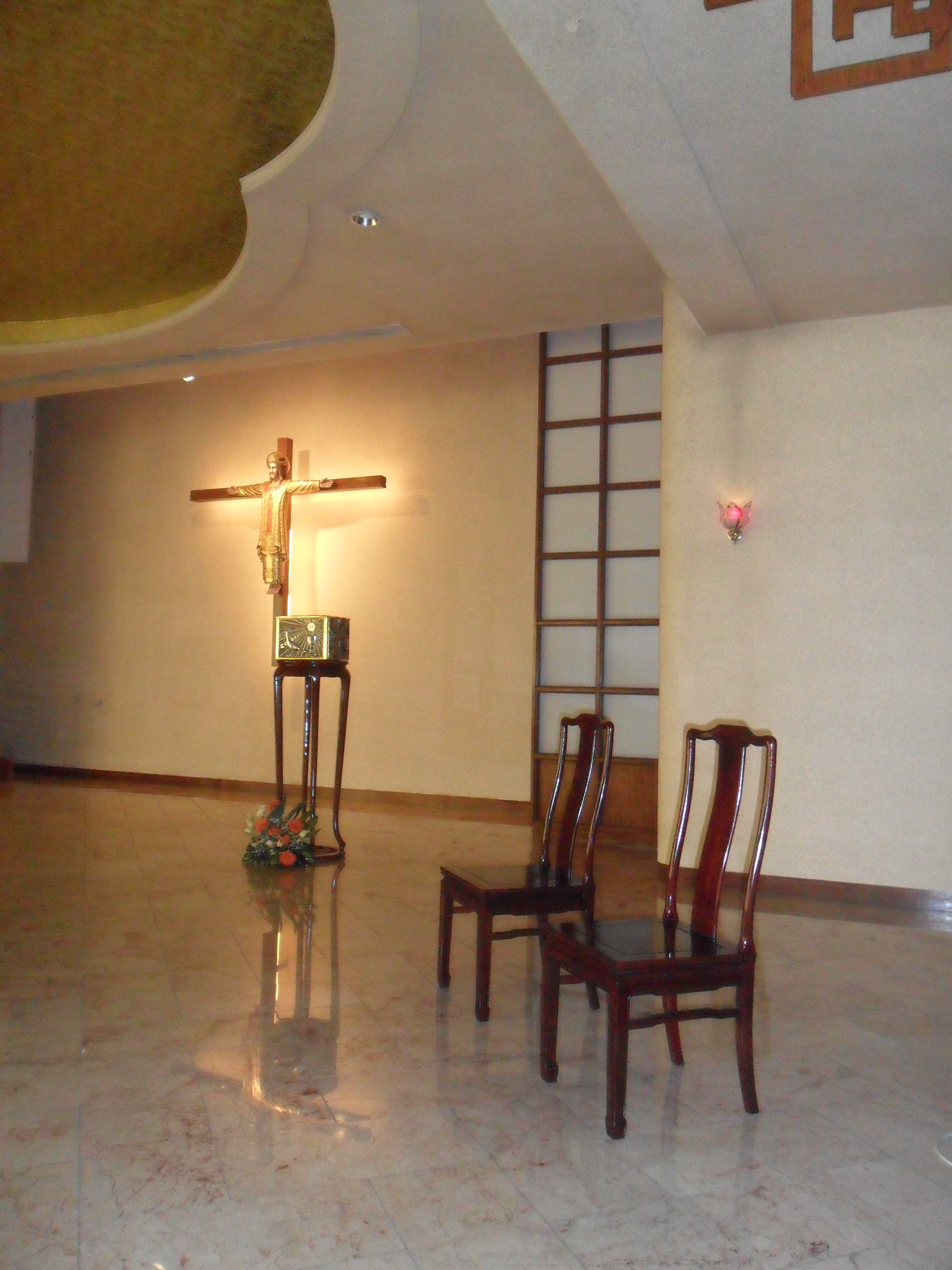 中文（香港）: 聖斯德望堂, 香港, 中國